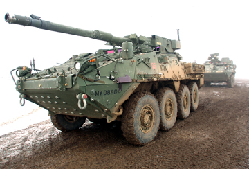 Mobile Gun System from an angle